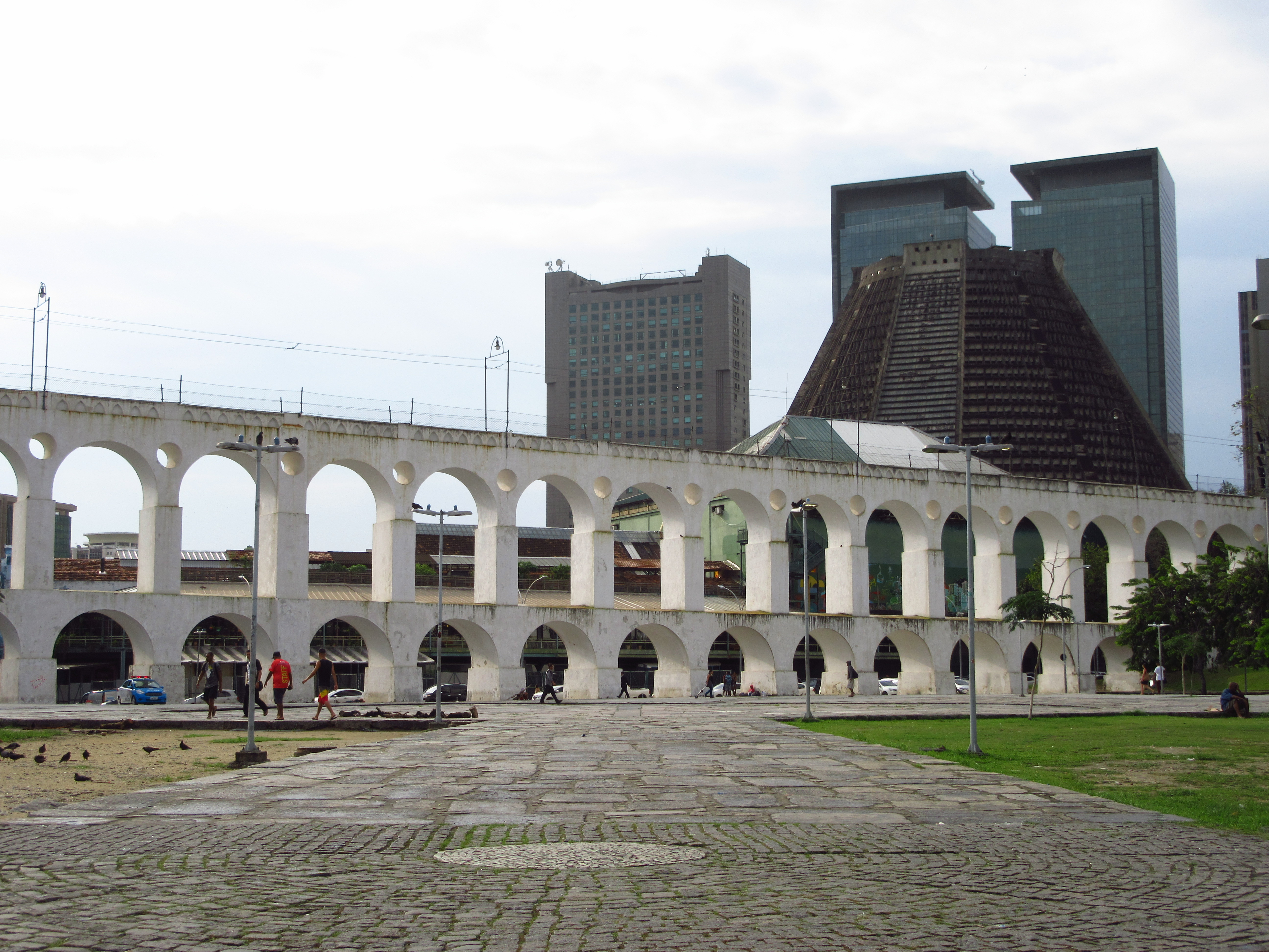 El Acueducto Carioca, popularmente conocido como Arcos da Lapa por encontrarse en la zona de Lapa,1​ es una estructura monumental del Centro de Río de Janeiro, Brasil. Considerada como un hito de la arquitectura colonial de Brasil, es hoy una de las postales de la ciudad, el símbolo más representativo de la antigua conservada en el bohemio de río Lapa.